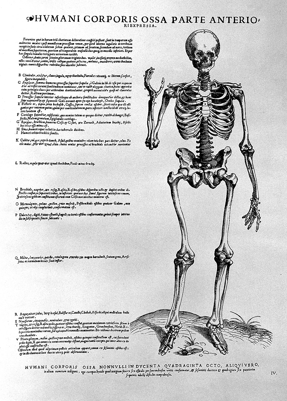 Skeleton, 'humani corporis ossa parte anterio' Rare Books Keywords: Skeleton